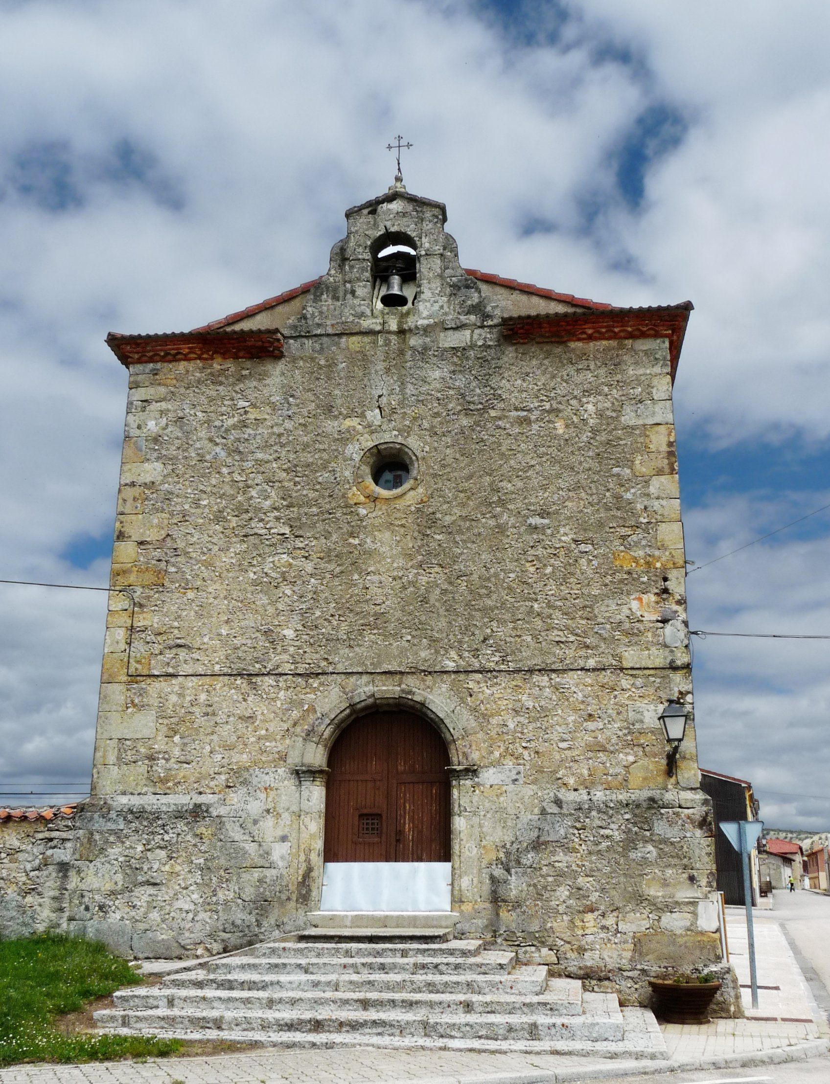 Cabrejas del Pinar - Ermita de Santa Ana - Fachada